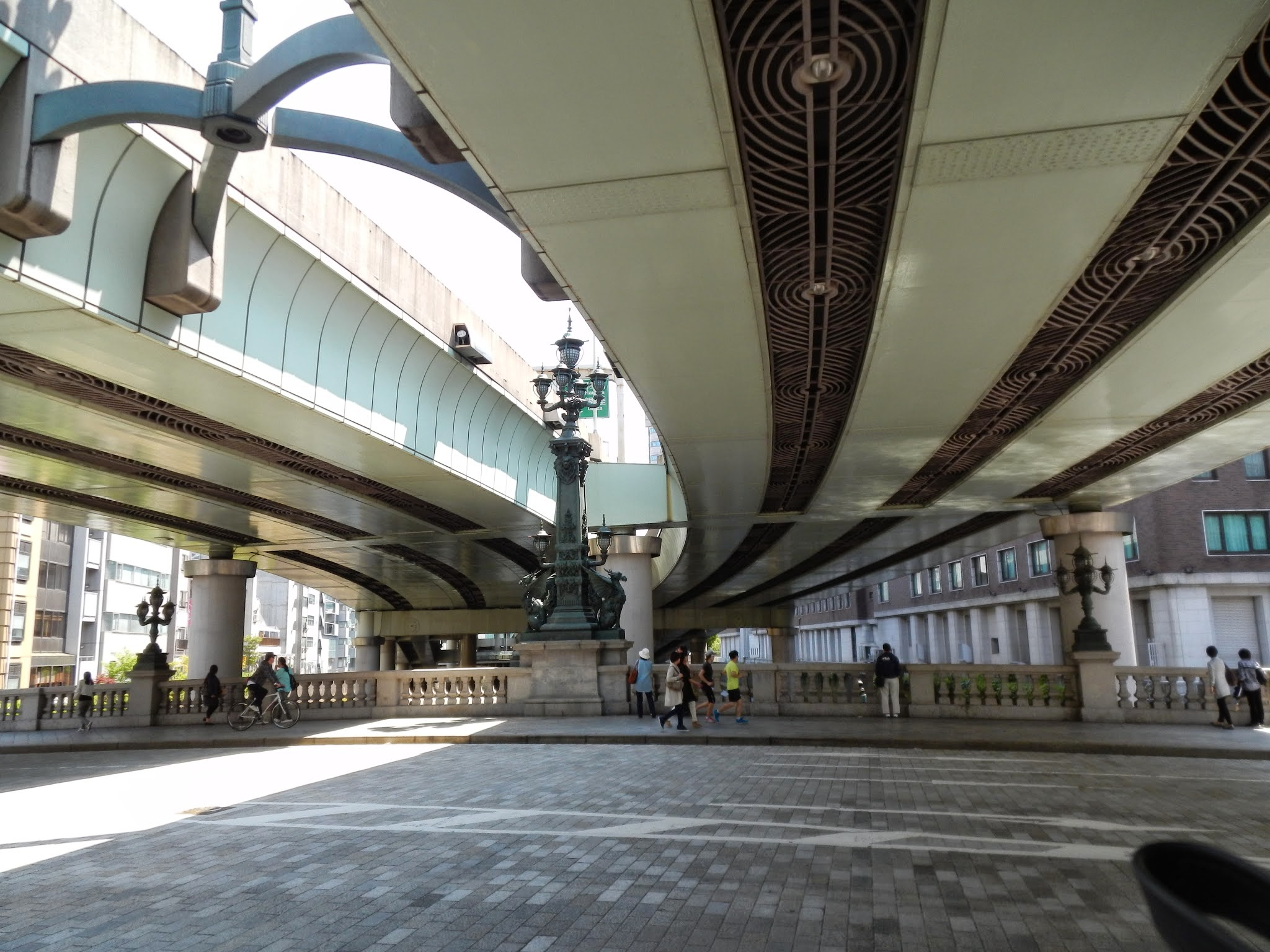 1 Chome Nihonbashi, Chūō-ku, Tōkyō-to 103-0027, Japan